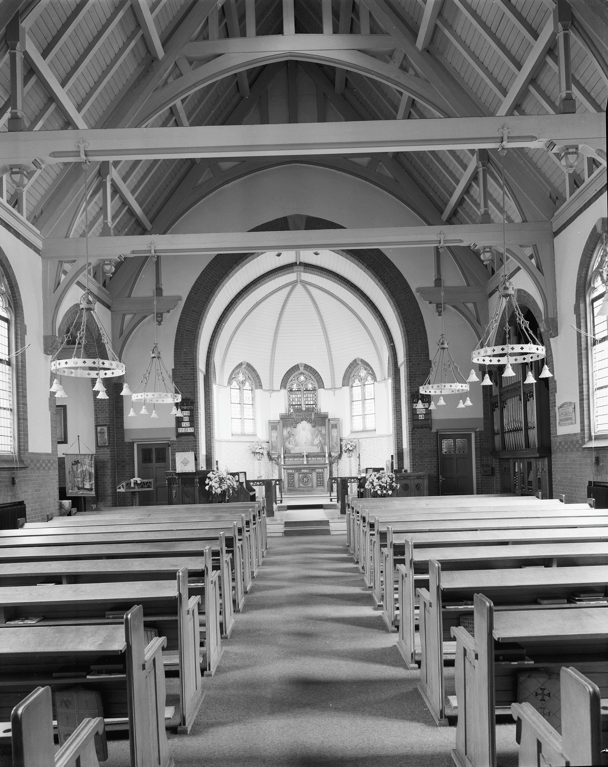 Engelse Kerk: interieur naar het oosten